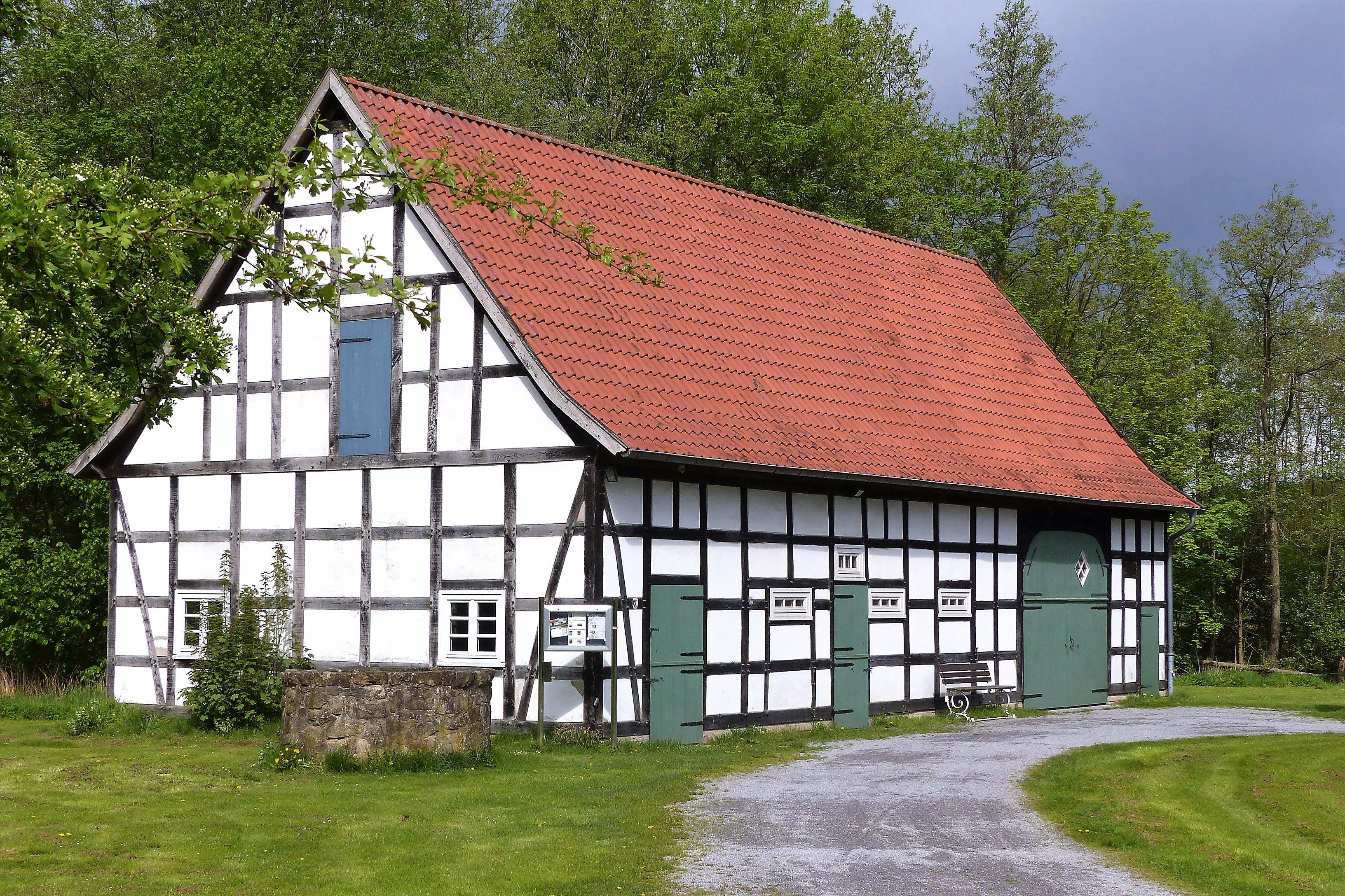 Scheune, 19. Jahrhundert